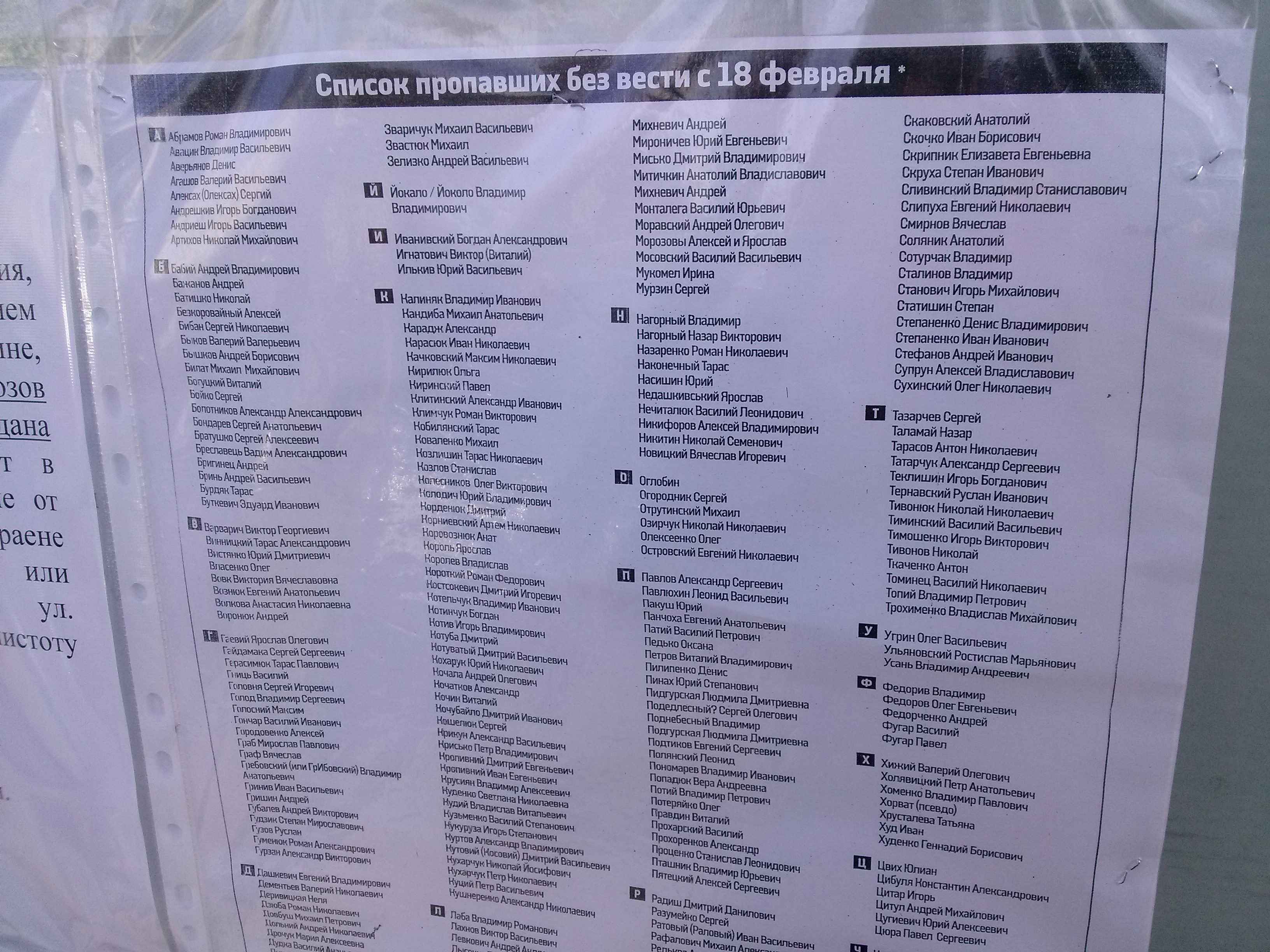 Список зниклих безвісти на Євромайдані